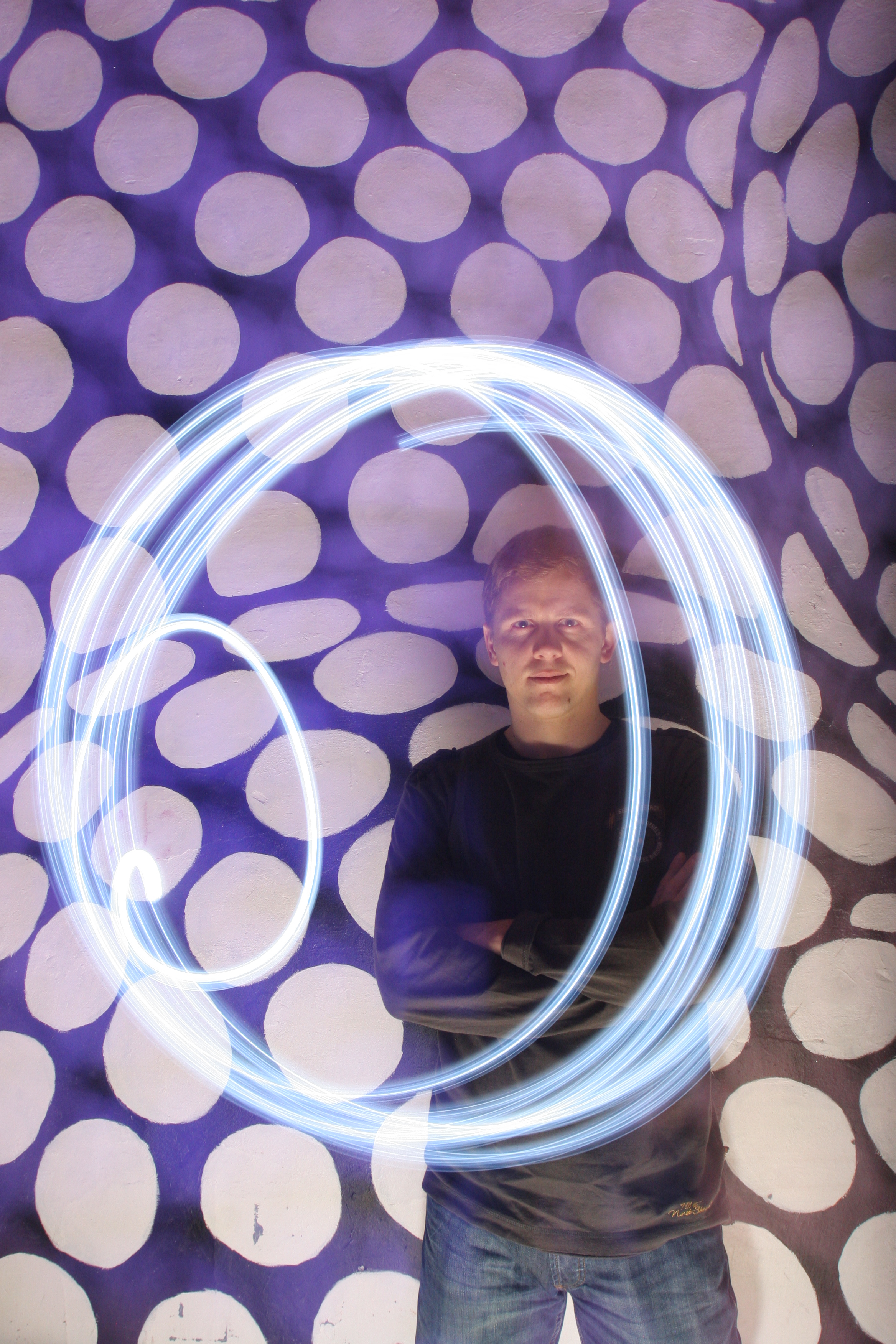 Pildil füüsik Mait Müntel.